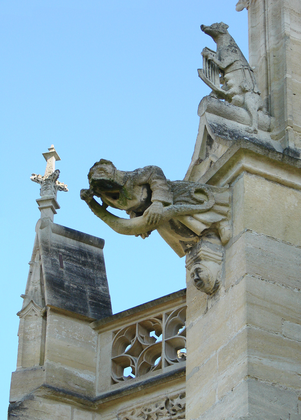 Gargouilles de la basilique Notre-Dame de l'Epine (Du début XVème au début du XVIème siècle,restaurées (parfois abusivement) au XIXème siècle).France,Marne (51),L'Epine,région Champagne-Ardennes.La statue au-dessus de la gargouille représente une truie jouant de la harpe: elle pourrait être une allusion aux connaissances des druides, car le sanglier était le symbole du druide chez les Celtes et le mot "truie" a une ressemblance phonétique avec "druide" en Ancien Français.Ce motif, qui se trouve aussi sur la cathédrale de Chartres (proche du cadran solaire), pourrait appartenir au décor ésotérique des édifices religieux du Moyen-Age.